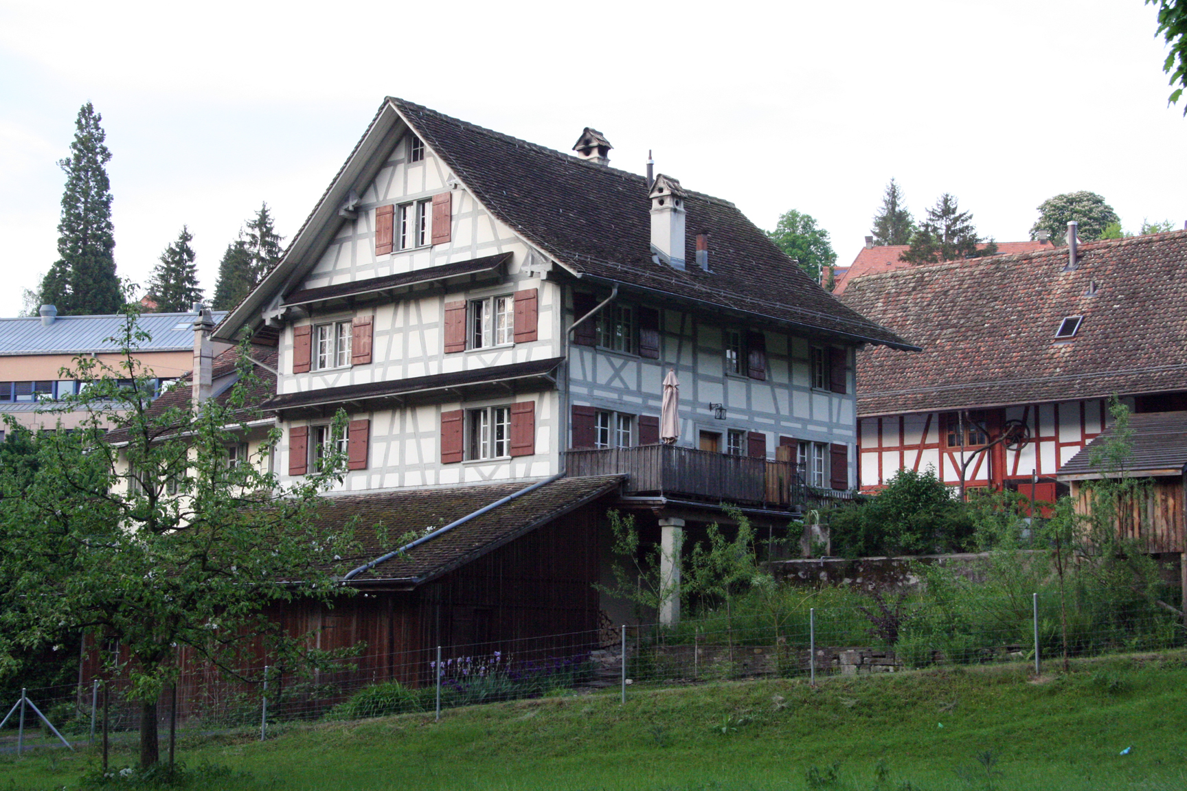 Historische Häusergruppe bei der Nägeli-Mühle in Zürich-Hirslanden. Im Vordergrund das sog. Lehenhaus, welches der Müller Johannes Nägeli 1747 erbauen liess.